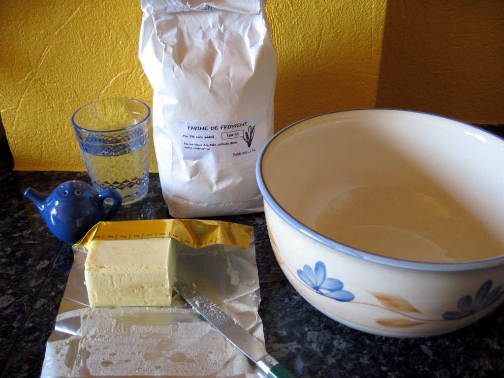 Recette de la pâte brisée, étape 0 (ingrédients)